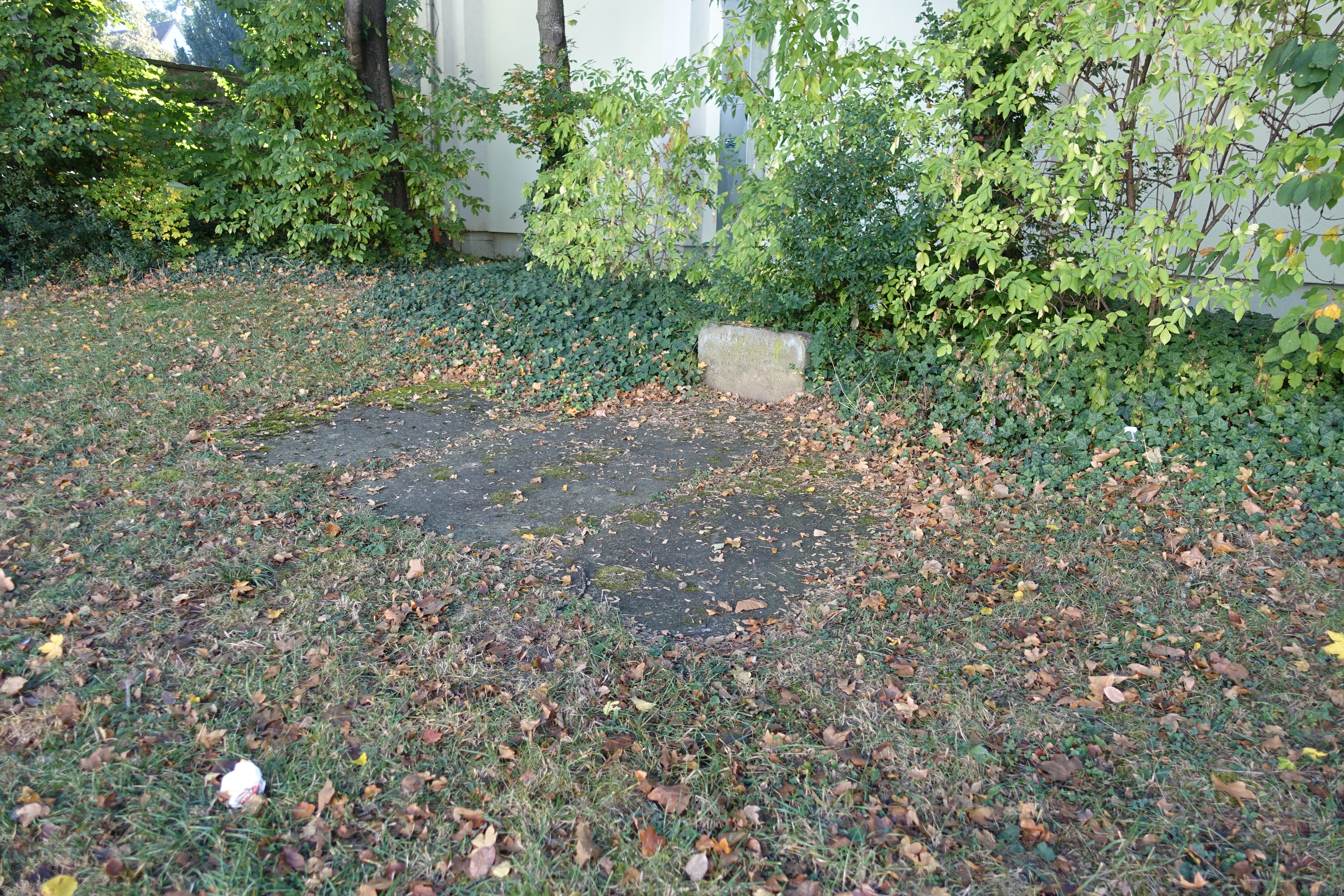 Reste des Plattenwegs, den Bürgermeister Jakob Speidel 1596 seinen Mitbürgern stiftete, um seinen Mitbürgern den Gang durch Matsch und Unrat zu ersparen, wenn sie zu einem Leichenbegängnis zur Uffkirche unterwegs waren. Die 3 Platten liegen in einem Rasenstück vor der Mauer des Uff-Kirchhofs an der Waiblinger Straße in Stuttgart-Bad Cannstatt. Ein Denkstein weist auf den Stifter hin: „Plattenweg vom Oberen Tor zur Uffkirche gestiftet vor 1600 von Bürgermeister Speidel“.